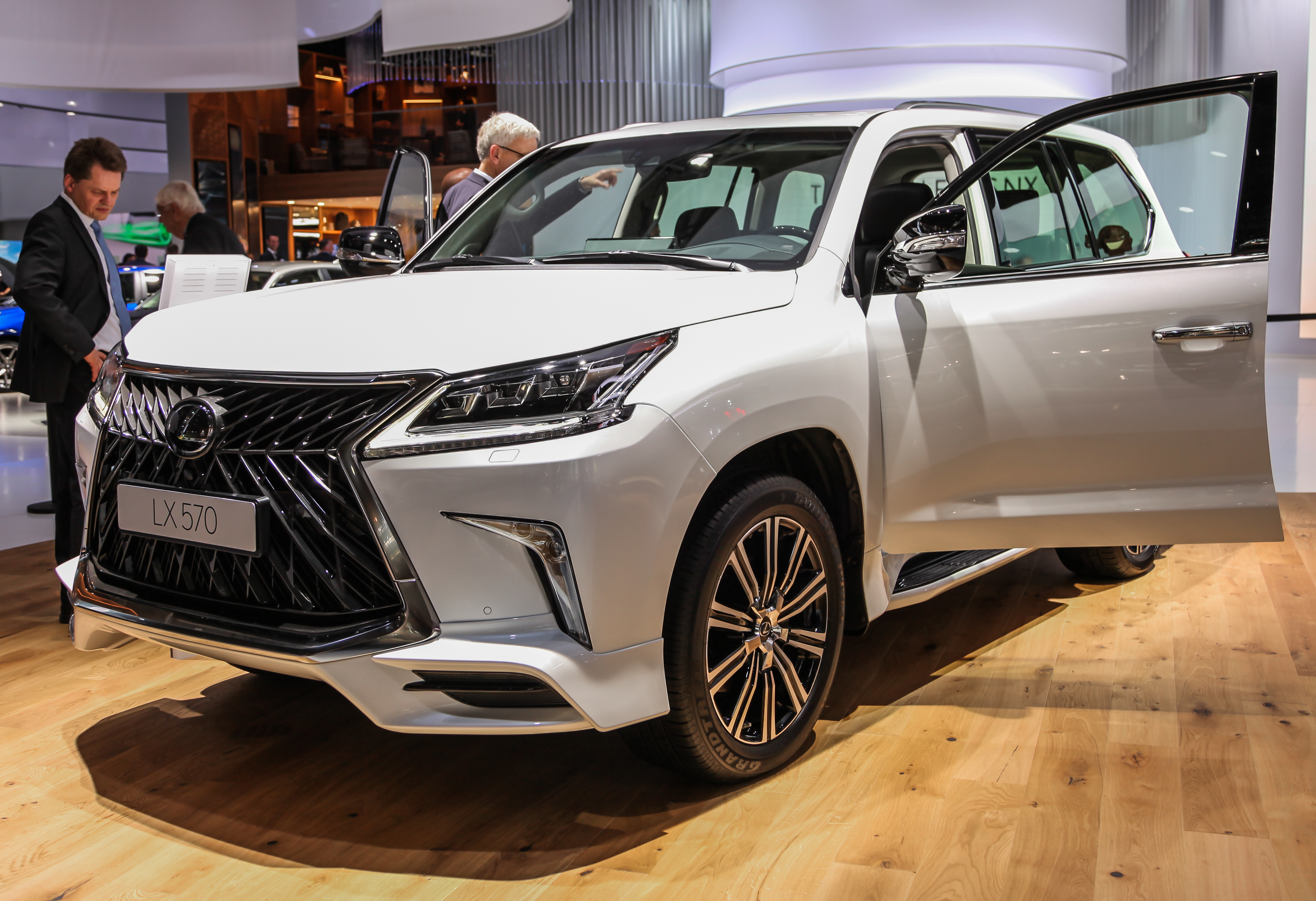 Lexus LX 570 auf der IAA 2017